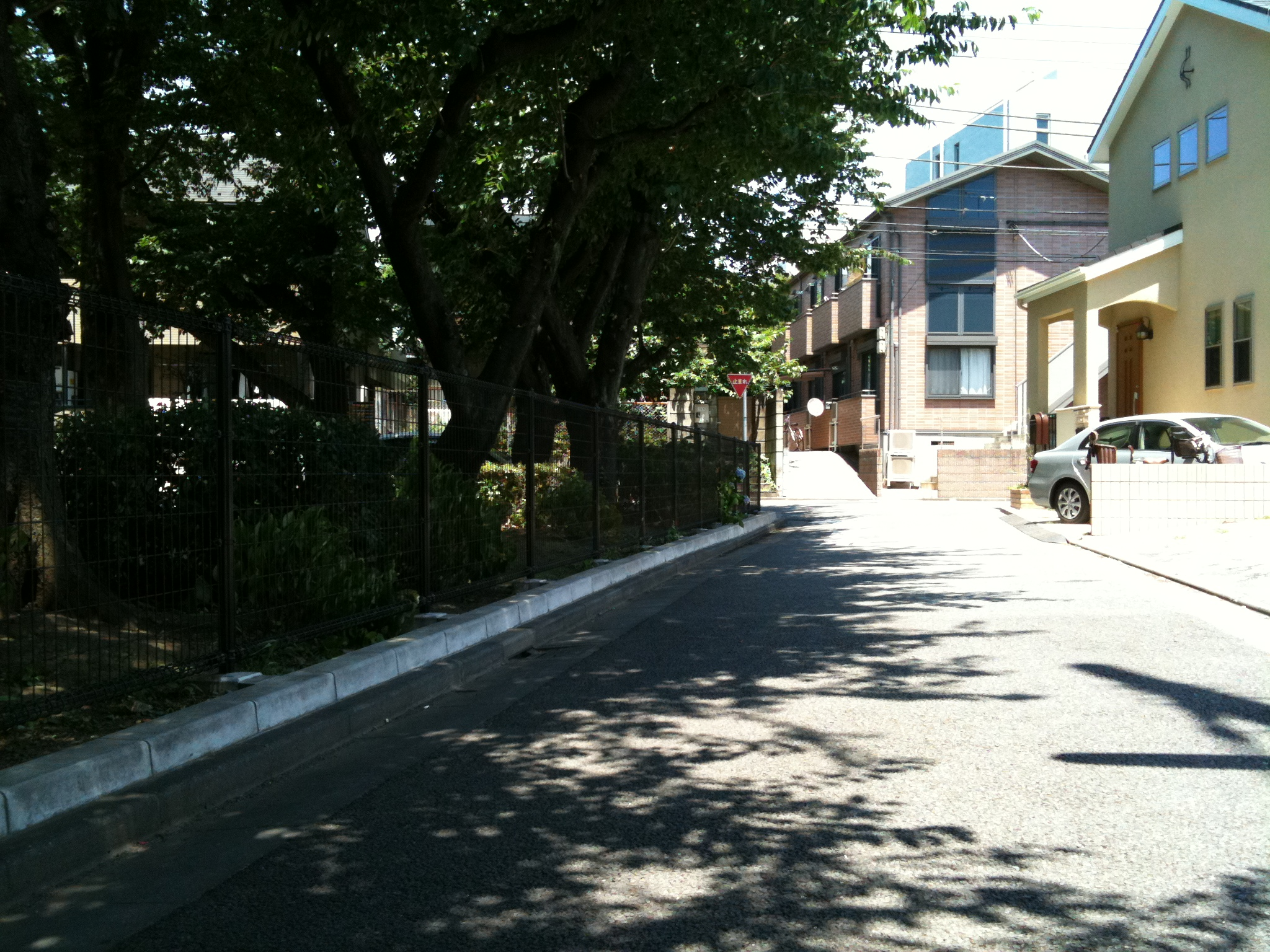 6 Chome Funabashi, Setagaya-ku, Tōkyō-to 156-0055, Japan